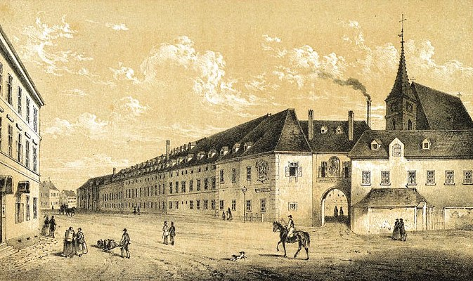 Sankt Marxer Versorgungshaus im 19. Jahrhundert